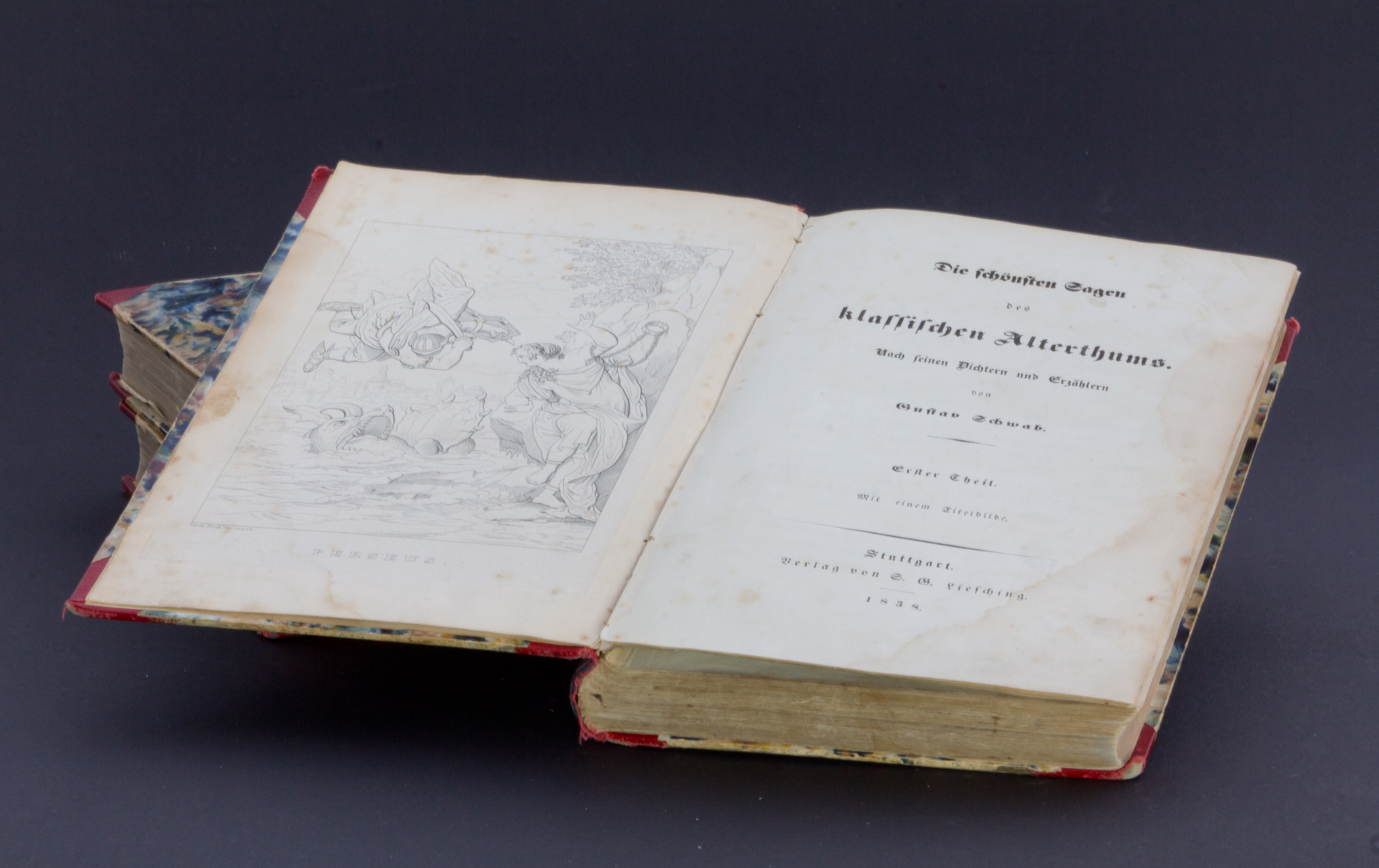 Die schönsten Sagen des klassischen Altertums, Gustav Schwabs, Innentitel Erster Theil